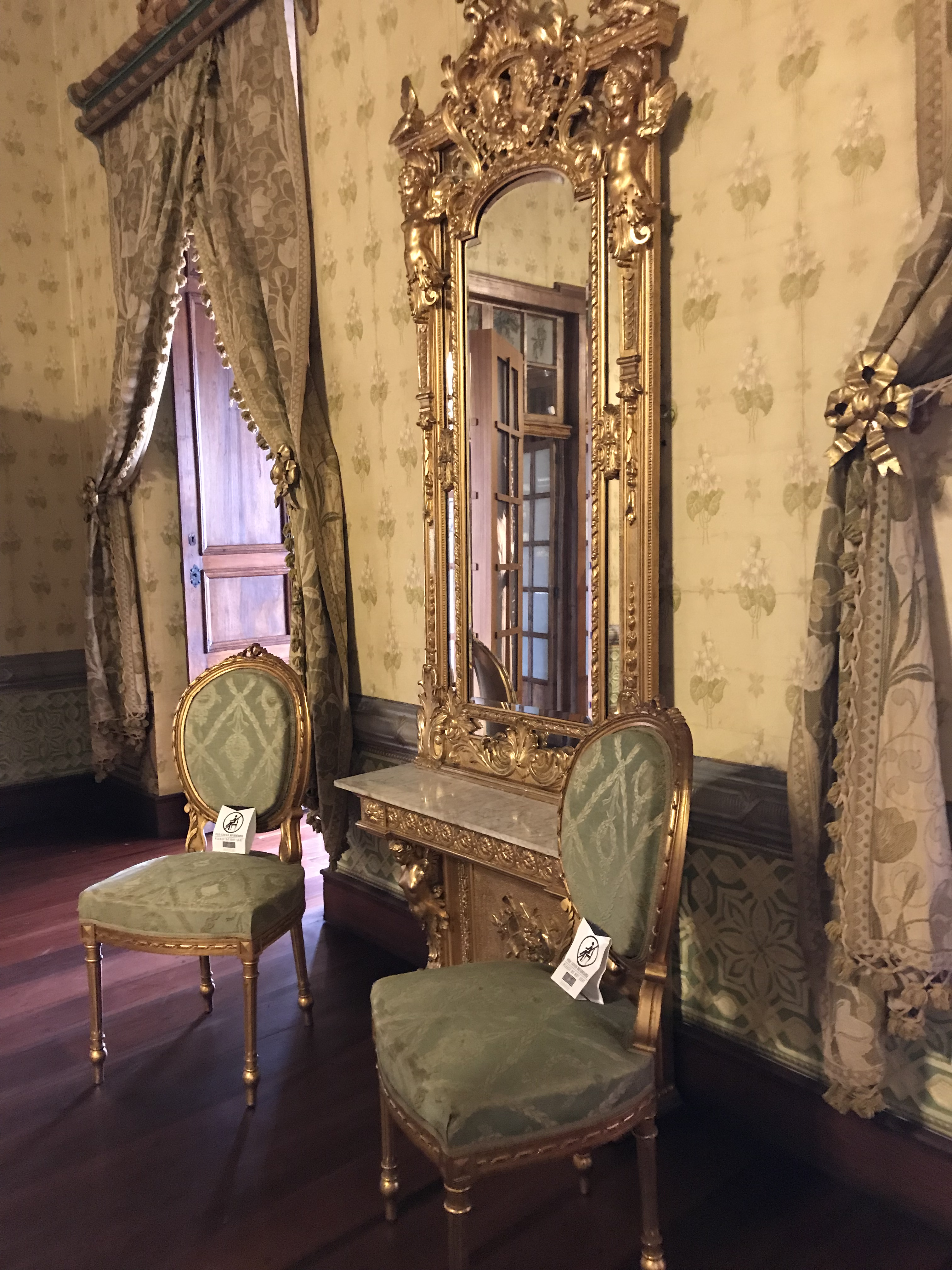 Imagen tomada en la Casa Museo Remigio Crespo Toral